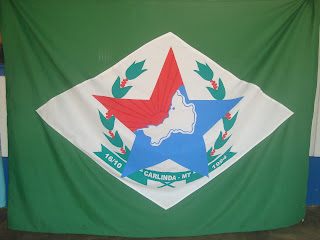 Bandeira de Carlinda